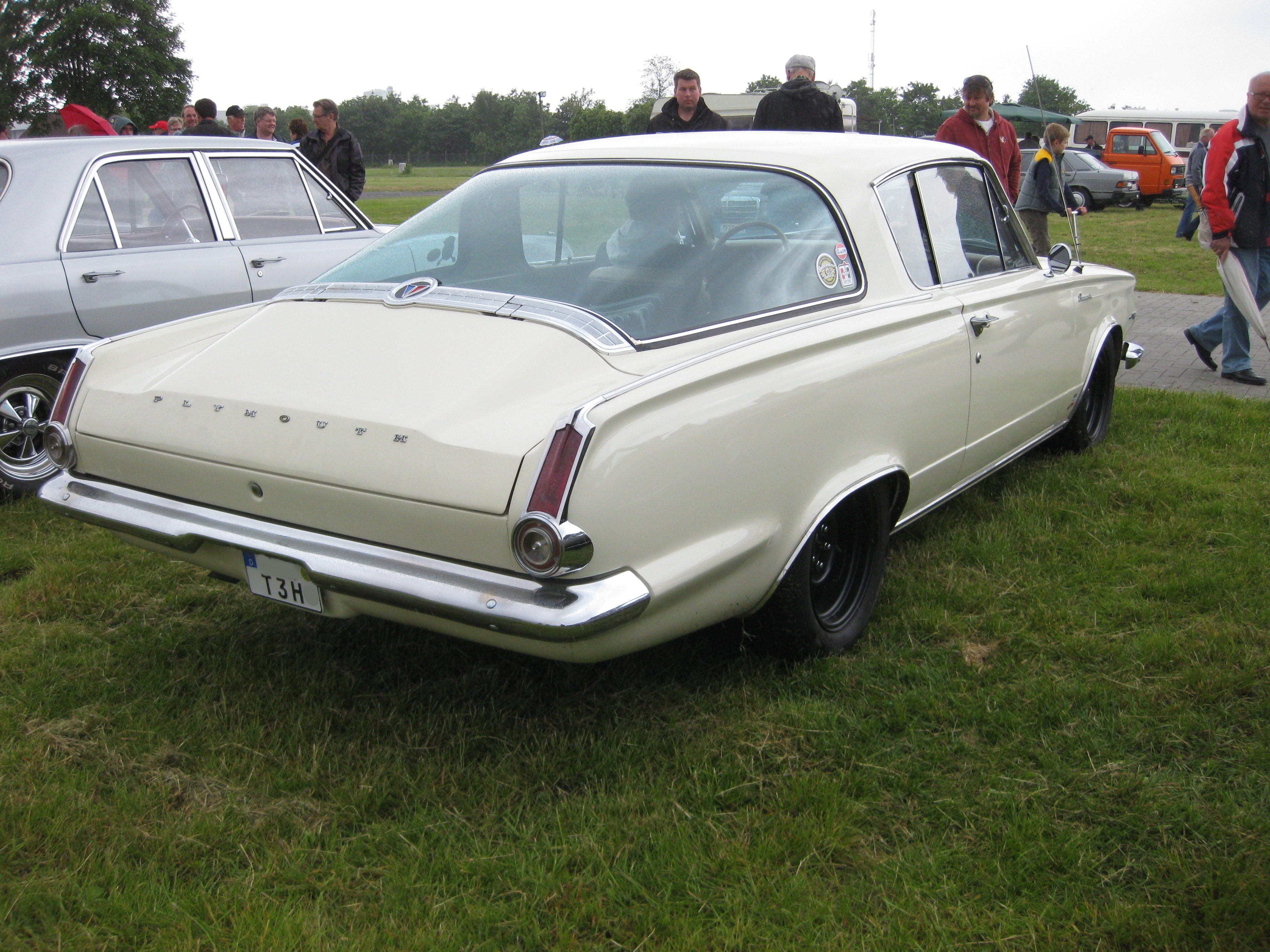 Plymouth Barracuda